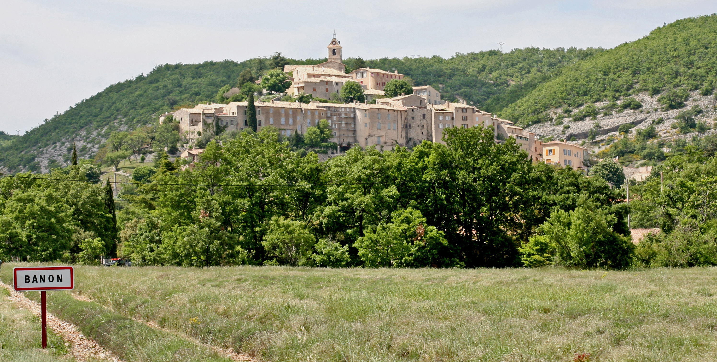 L'arrivée sur Banon, commune des Alpes-de-haute-Provence, France.